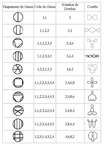 tableau des courbes à 1, 2 et 3 croisements